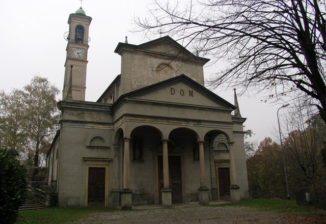 Chiesa Vecchia - Verano Brianza 11/2006